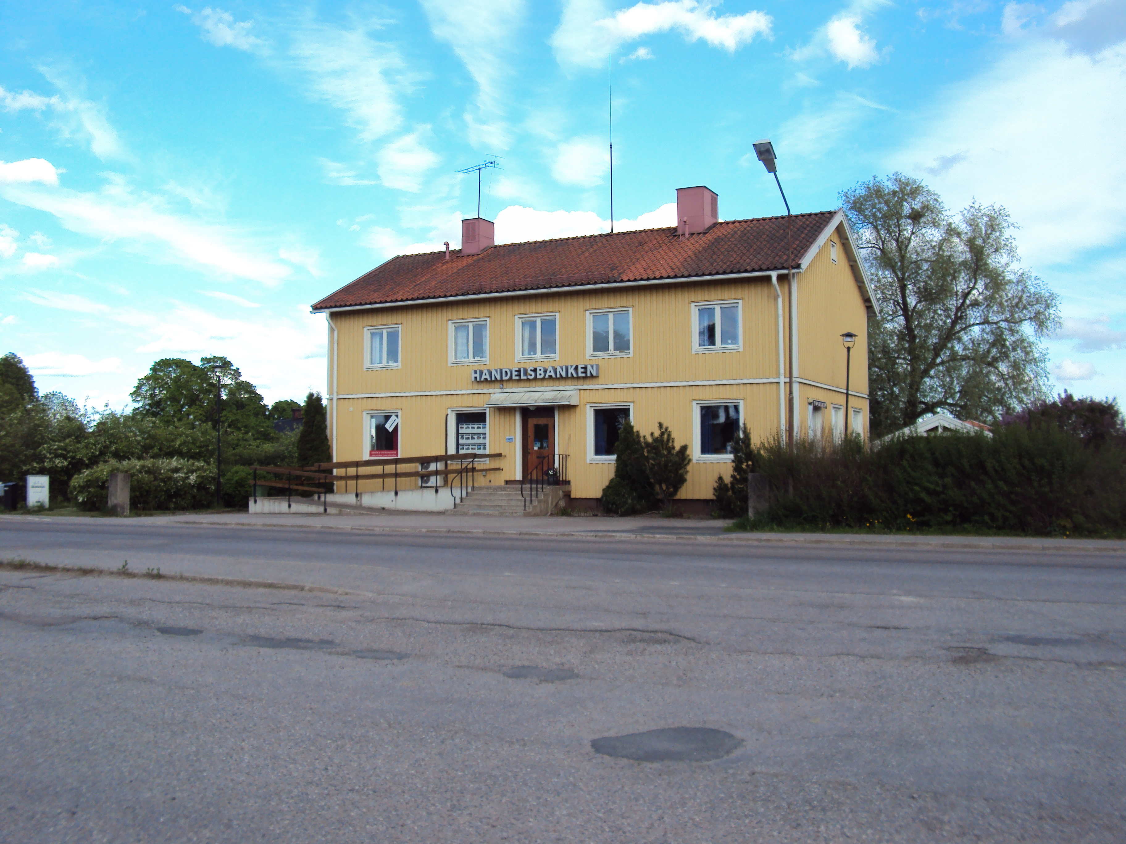 Handelsbanken i Torsåker